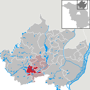 Milmersdorf in Brandenburg (Country) - District Uckermark